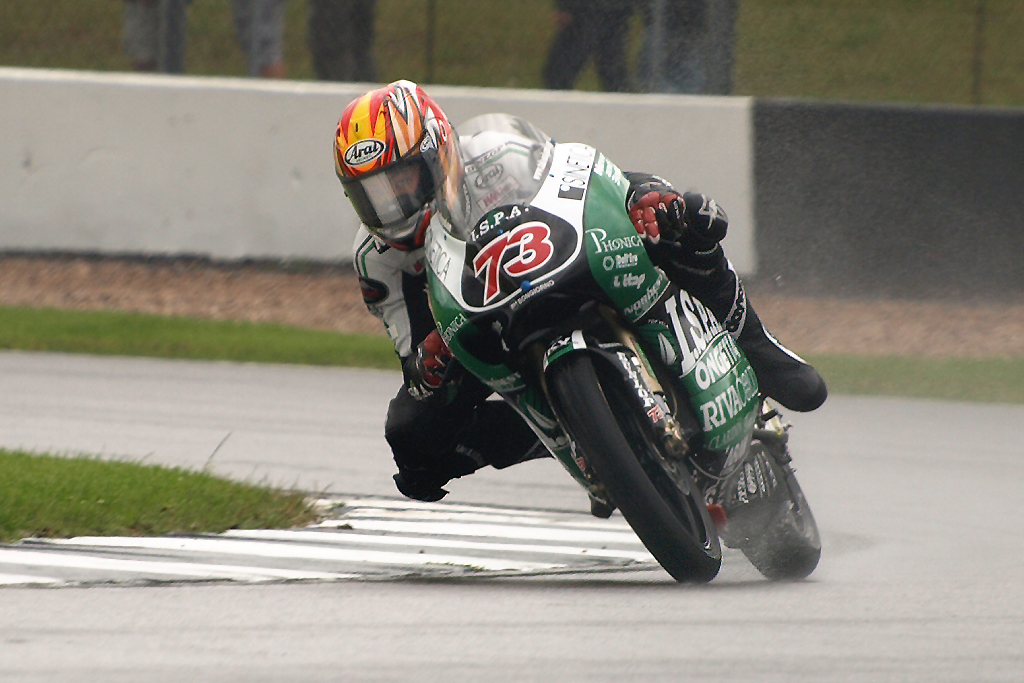 Takaaki Nakagami at the 2009 British Grand Prix.